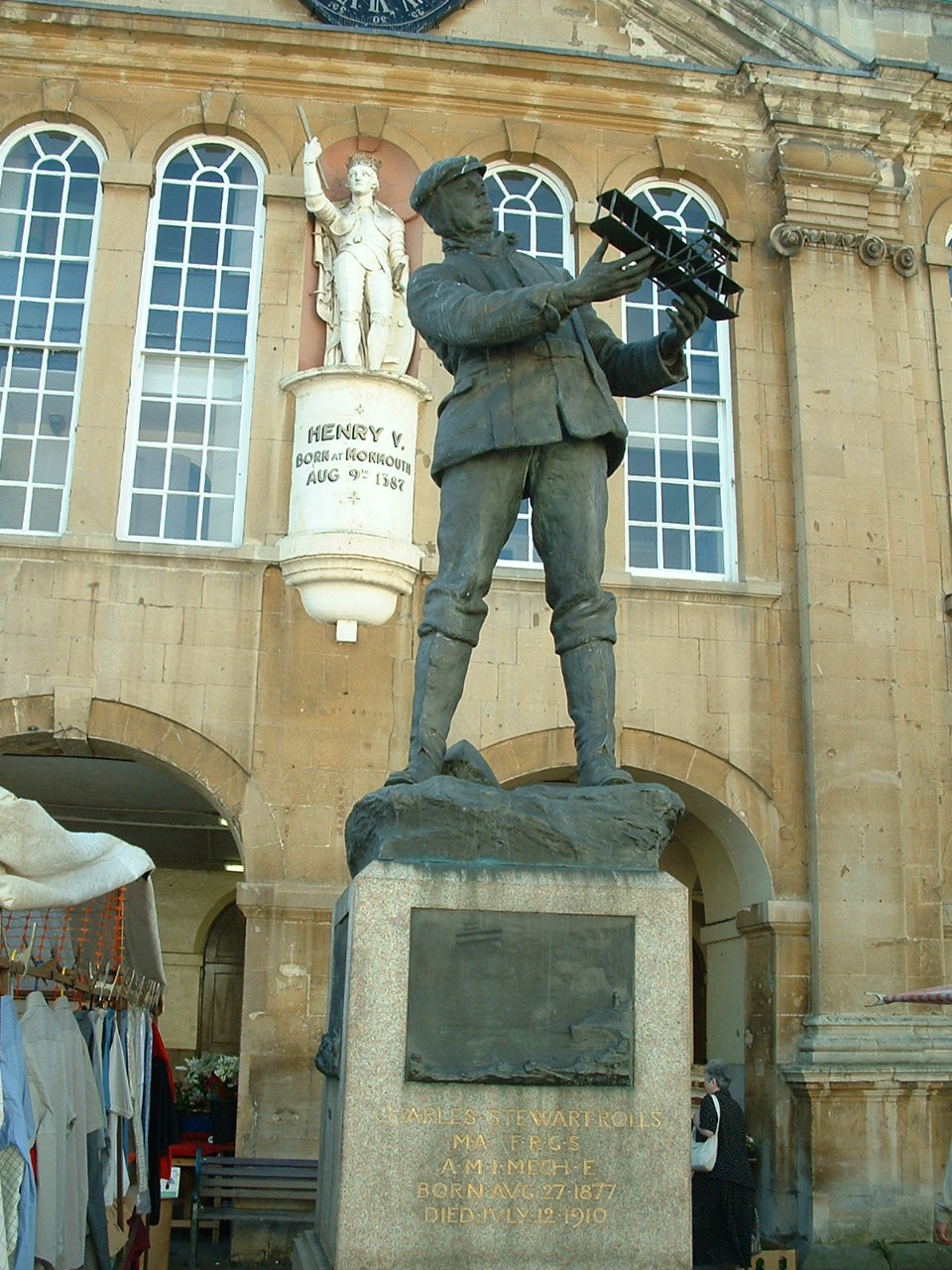 eigen opname